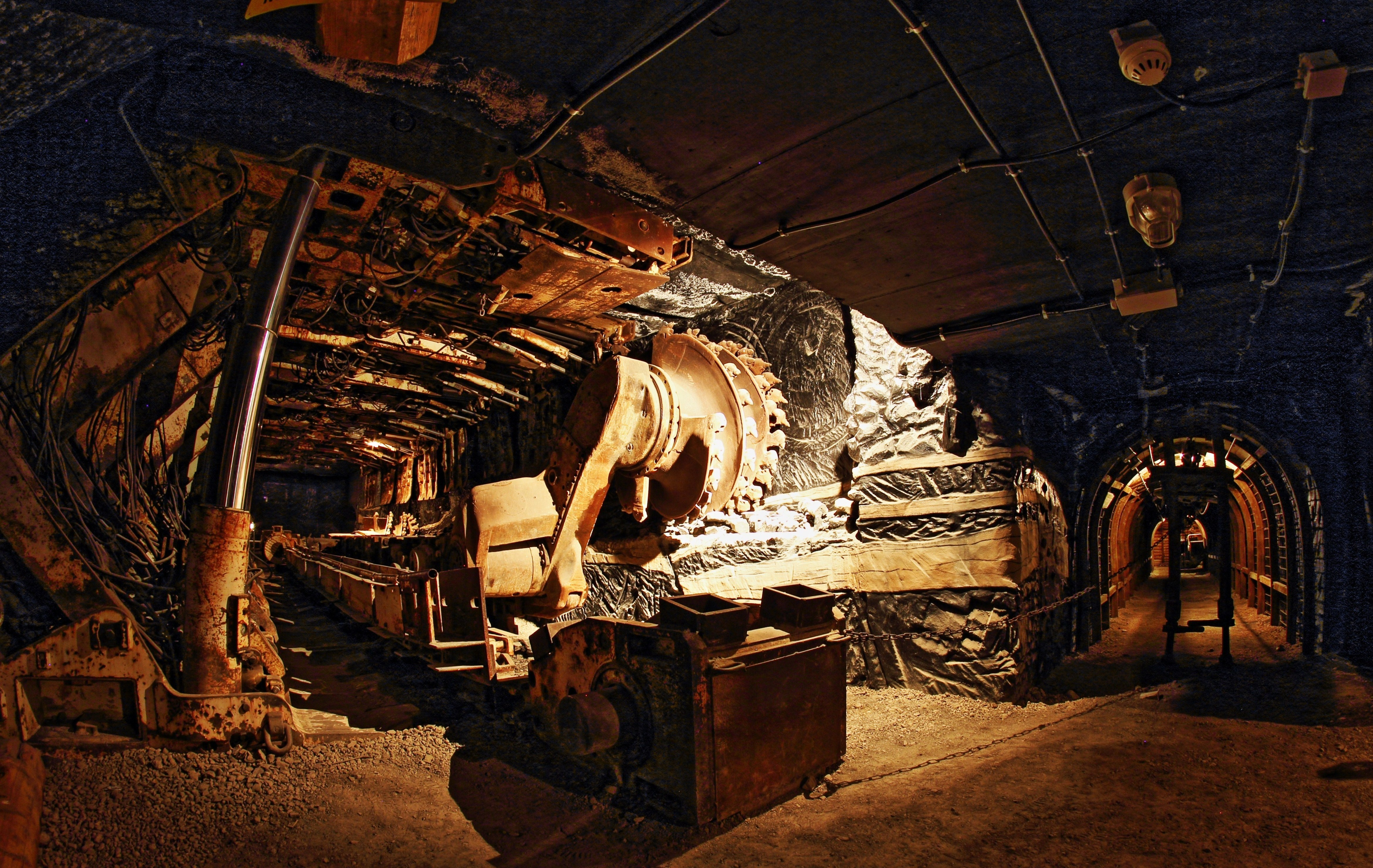 Museo del Carbone This is a photo of a monument which is part of cultural heritage of Italy.